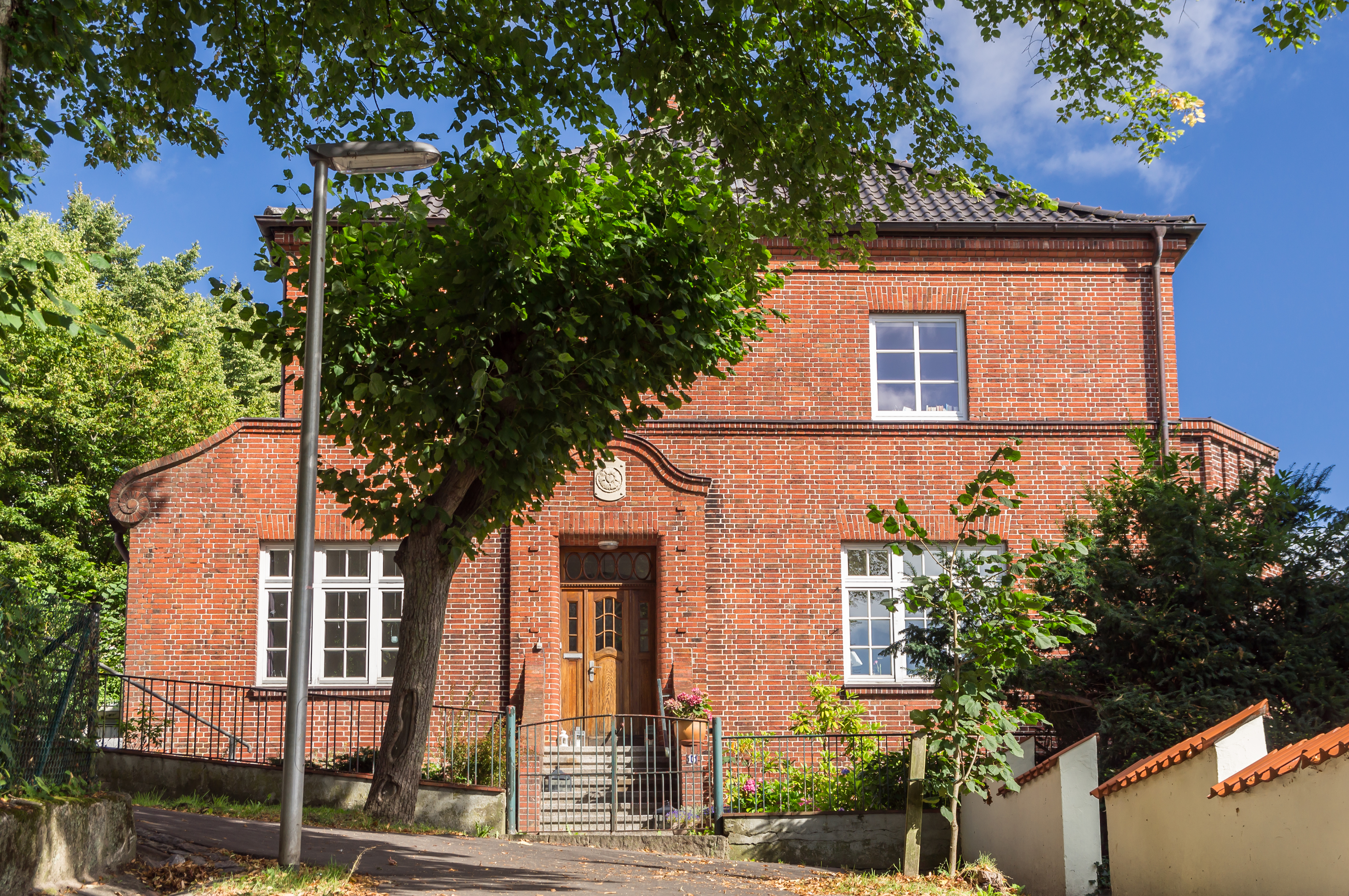 Flensburg-Nordstadt; Turnerberg 16; Pastorat der Gemeinde St. Petri; Denkmal-Nr. 14